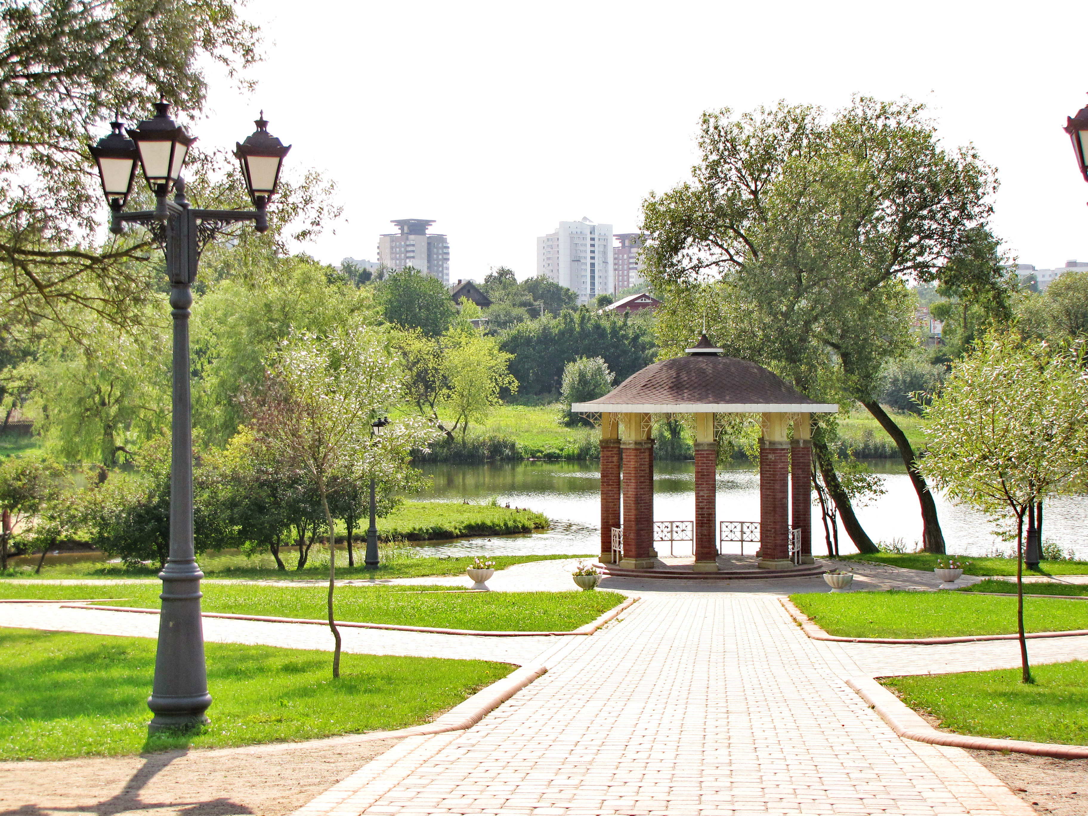 Беларуская (тарашкевіца): Лошыцкі сядзібна-паркавы комплекс: парк, сядзібны дом, флігель, домік вартаўніка, рэшткі капліцы, рэшткі млына, комплекс бровара, будынак былога млына. г. Менск This is a photo of Belarusian heritage monument. Reference number: 712Г000266 ( WLM)